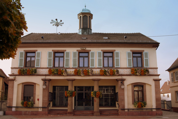 Mairie de Drusenheim .